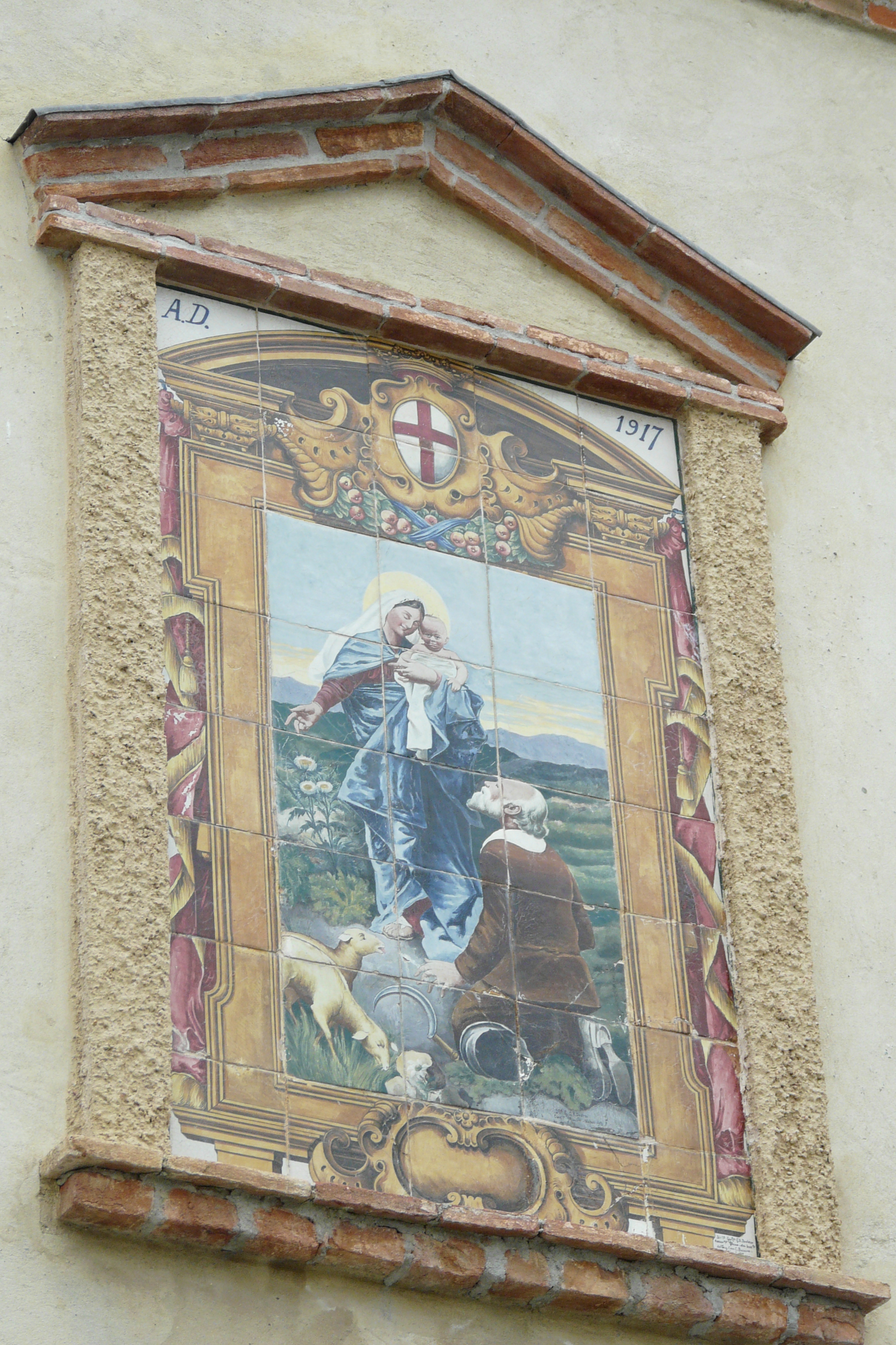 Particolare della Chiesa di San Giorgio a Sarissola, Busalla, Liguria, Italia